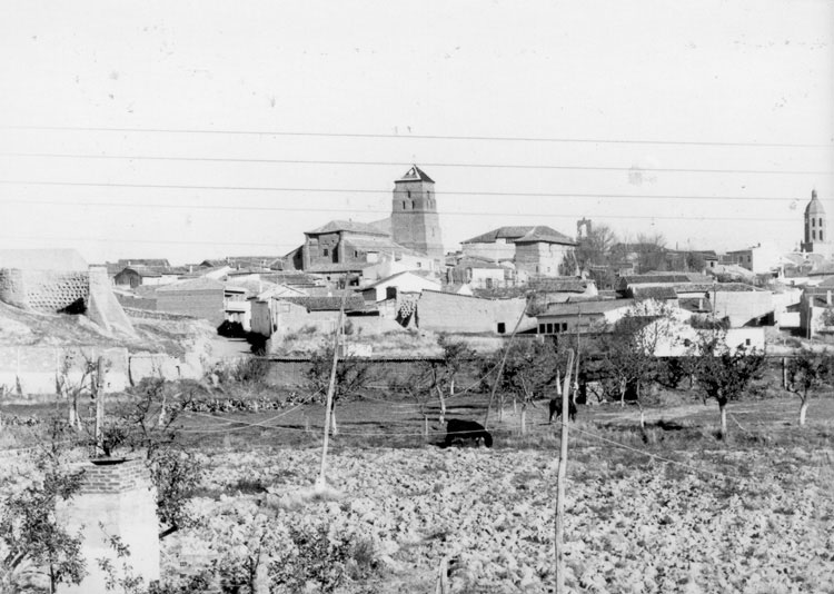 Vista panorámica - Mayorga (Valladolid) - Álbum 200 x 140 - Fotografía. Papel 110 x 80 B/N